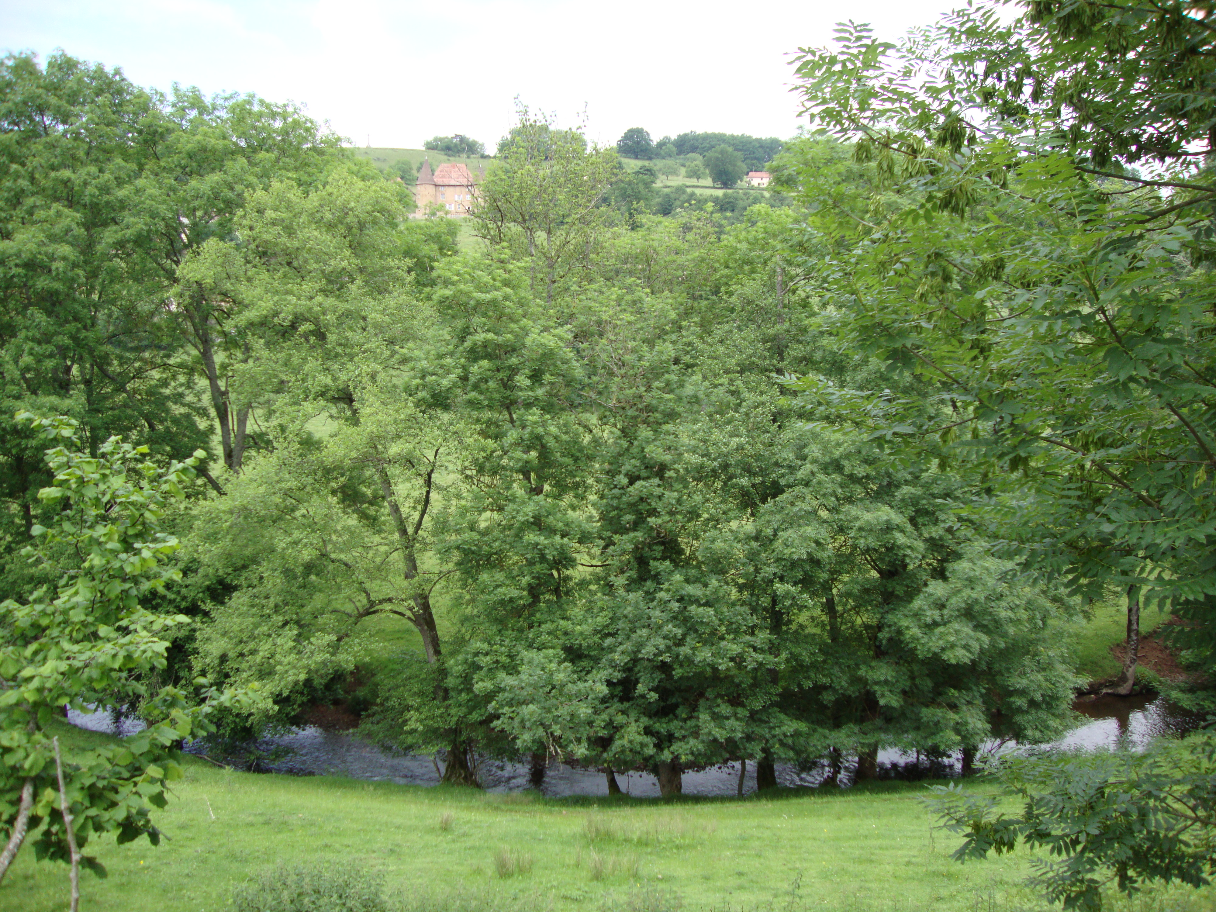 Maizilly (Loire, Fr) Paysage avec le Botoret (rivière)